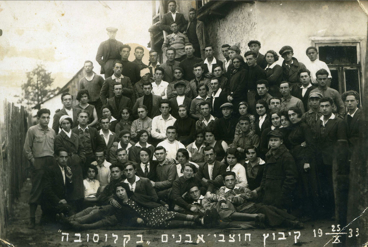 קיבוץ חוצבי האבנים בקלוסובה 25-אוקטובר-1933